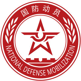 中文（中国大陆）: 国家国防动员委员会标志。